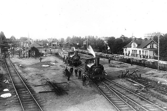 Frövi - Ludvika Järnväg, FLJ, Grängesberg station 1903.